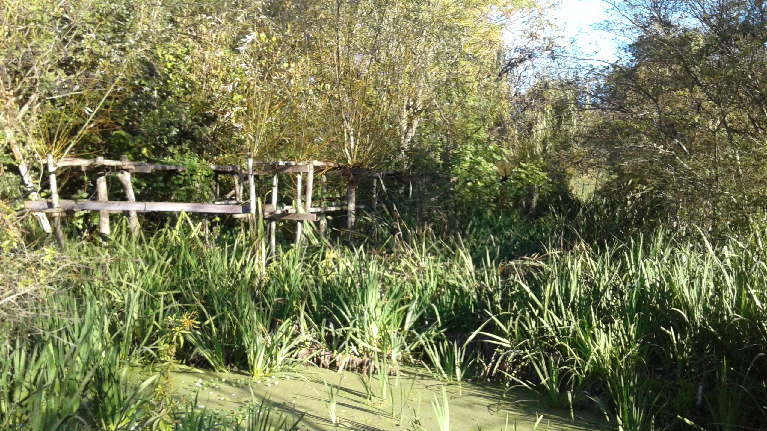 Zona de quintas